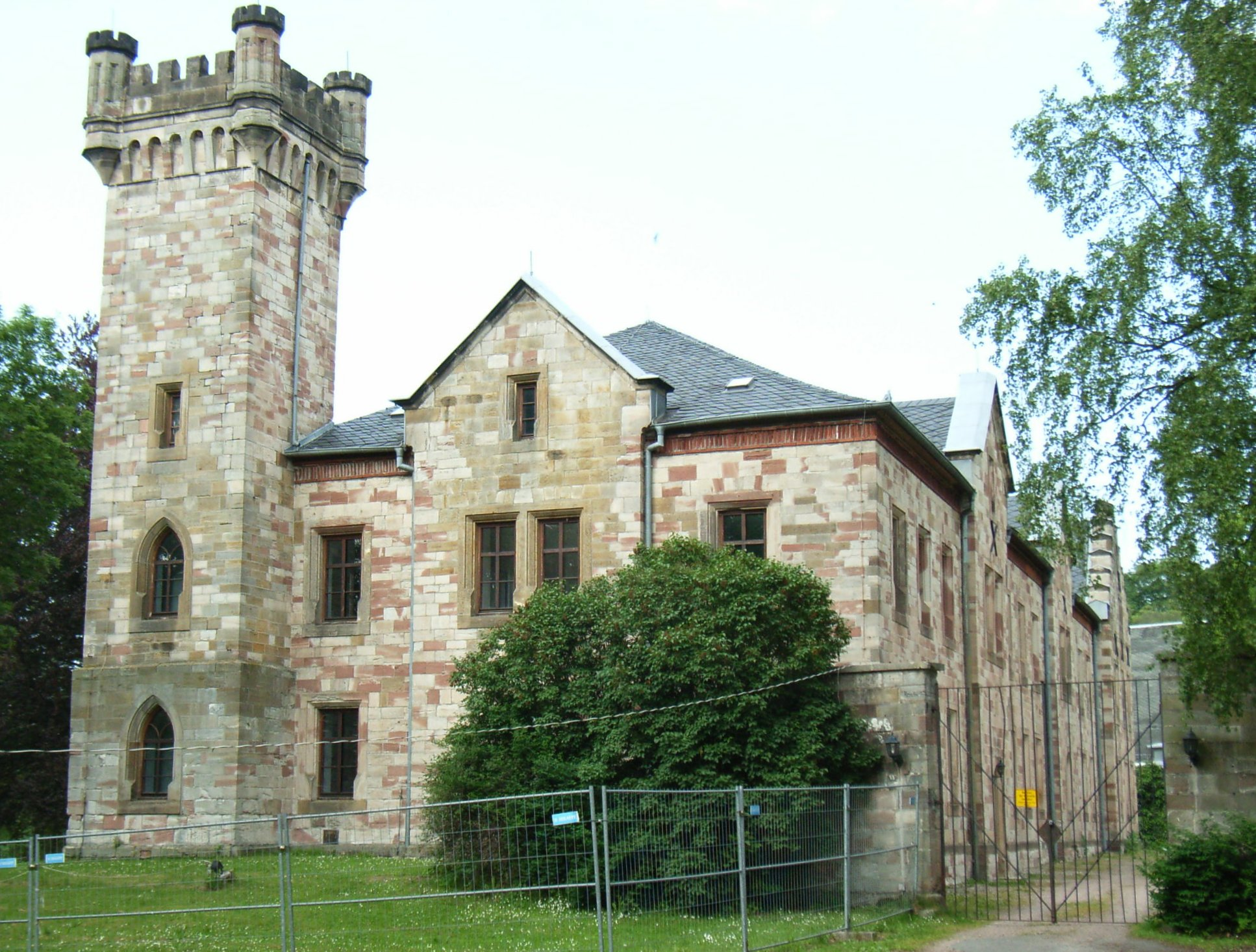 Friedrichroda-Reinhardsbrunn. Schloss Reinhardsbrunn